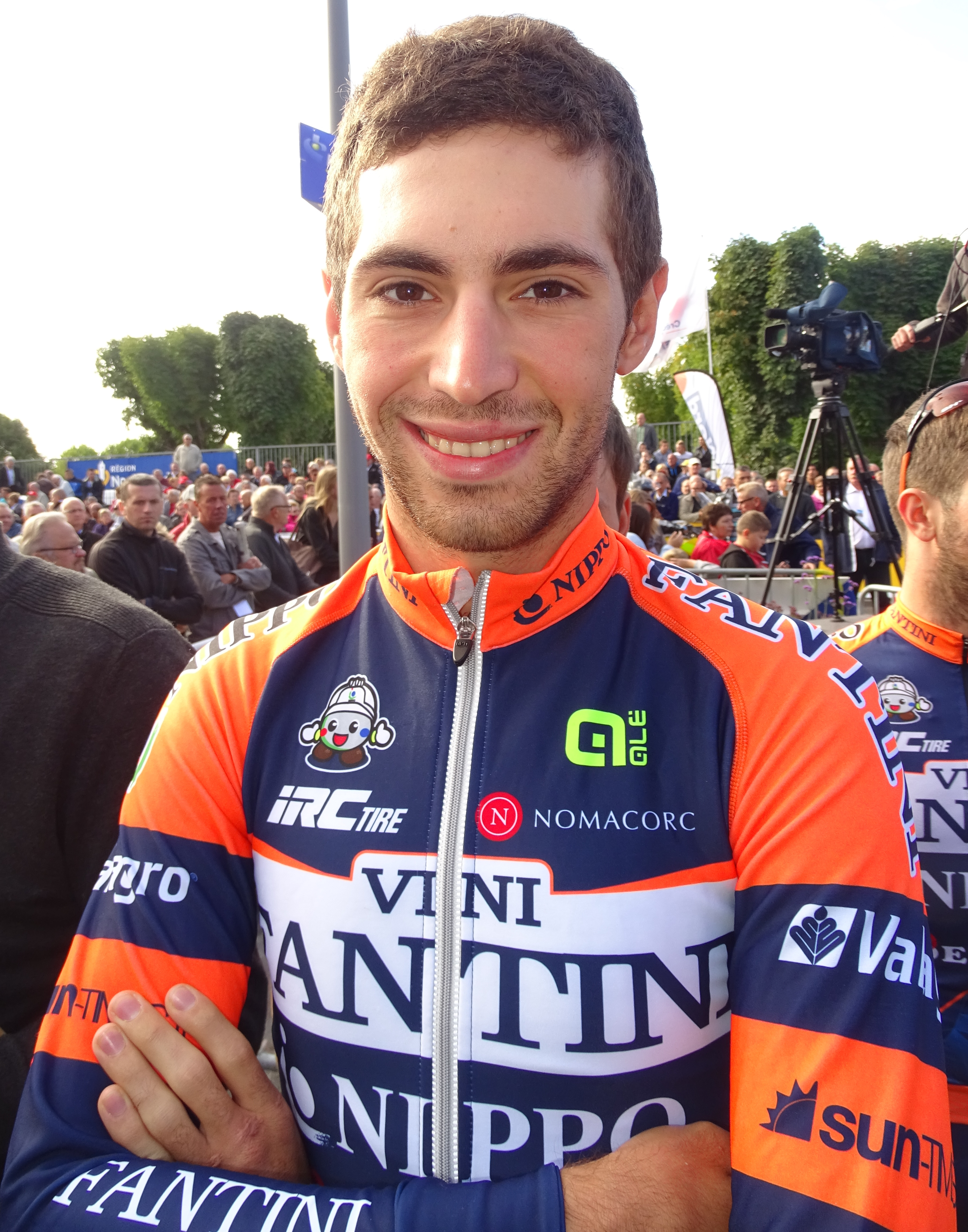 Reportage réalisé le dimanche 6 septembre à l'occasion du départ et de l'arrivée du Grand Prix de Fourmies 2015 à Fourmies, Nord-Pas-de-Calais, France.